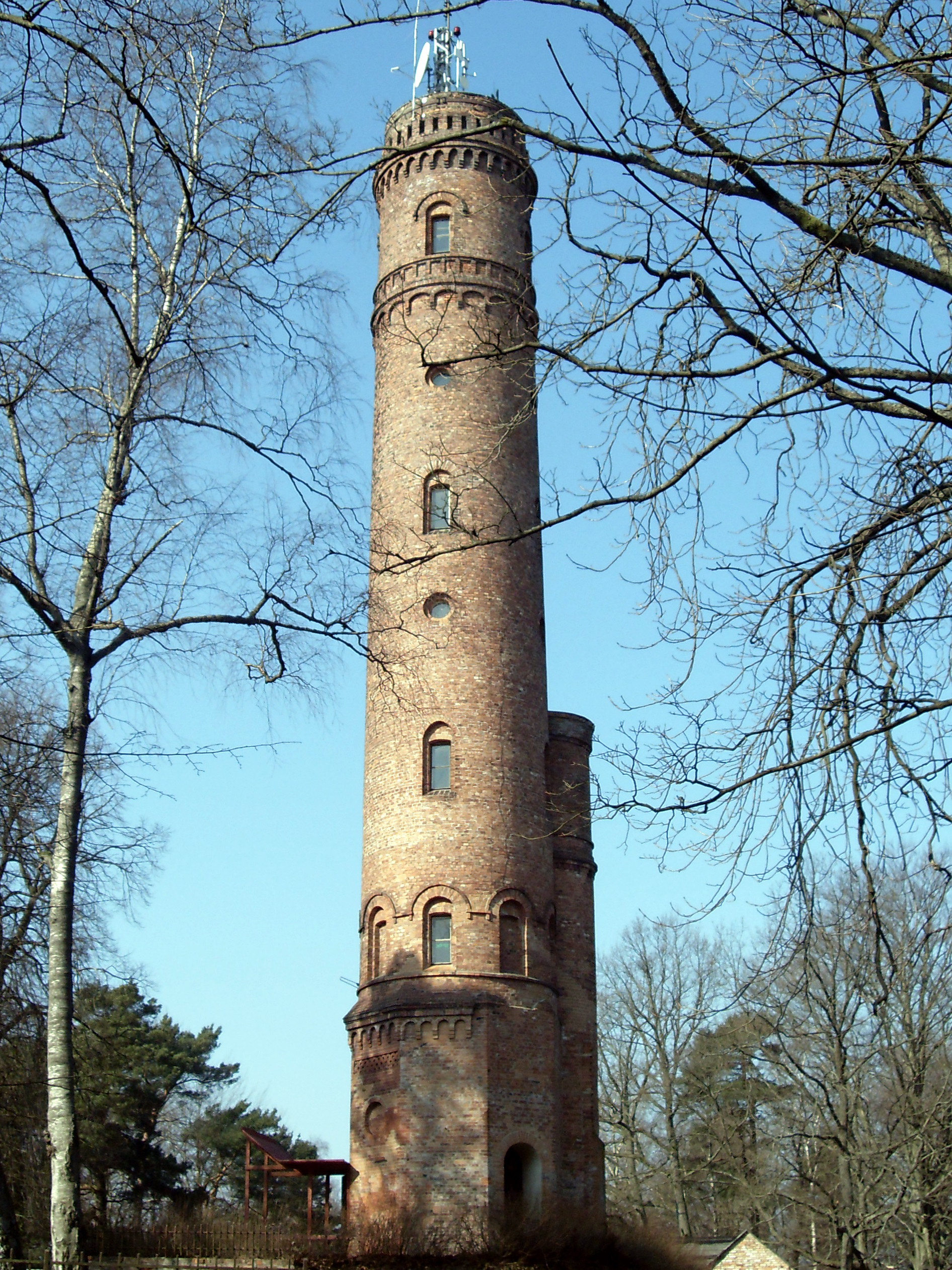 Wieża widokowa na Krzyżance w Koszalinie.